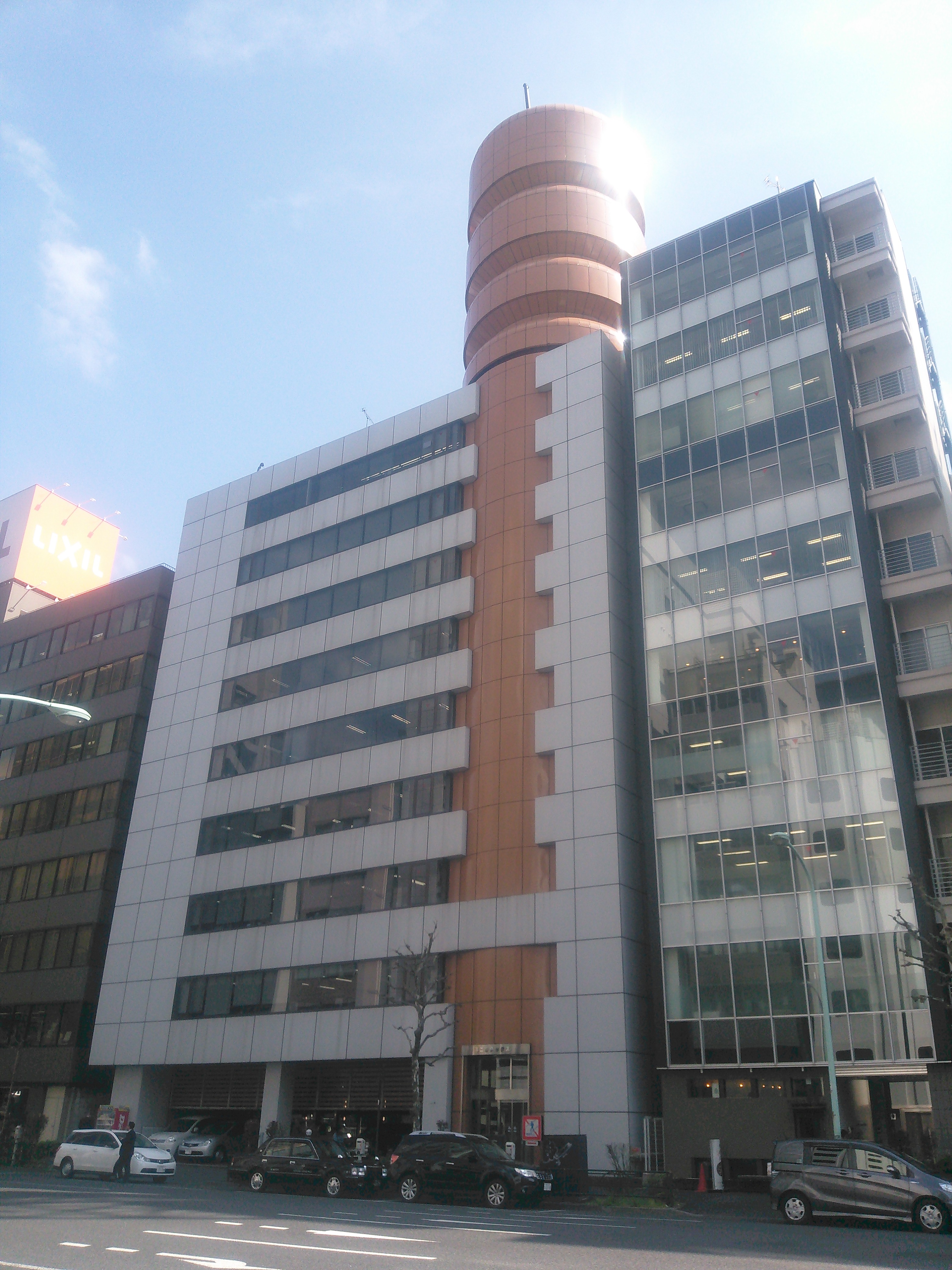 日本東京都千代田区神田錦町、不二ラテックス本社